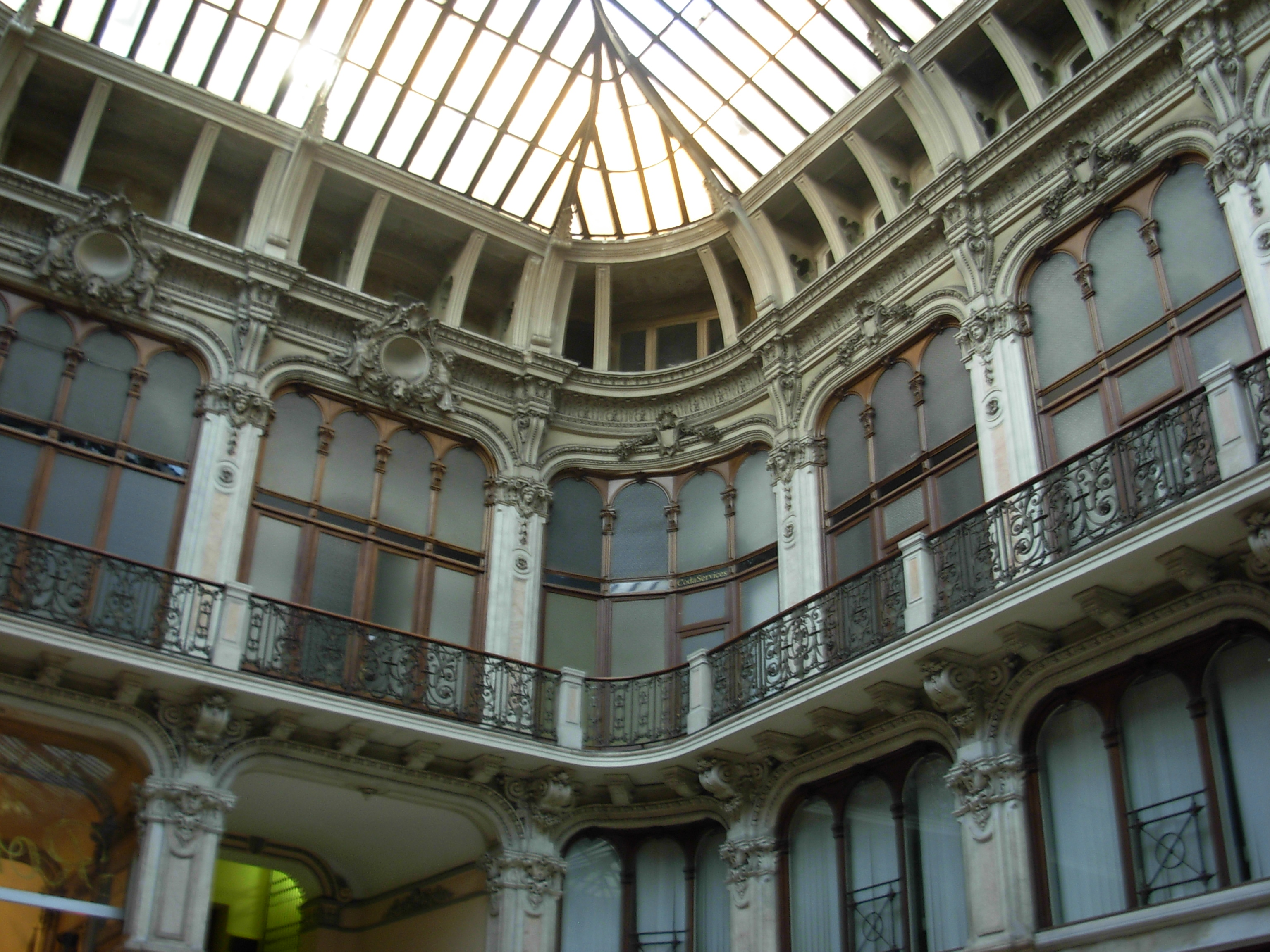 Edificio storico.